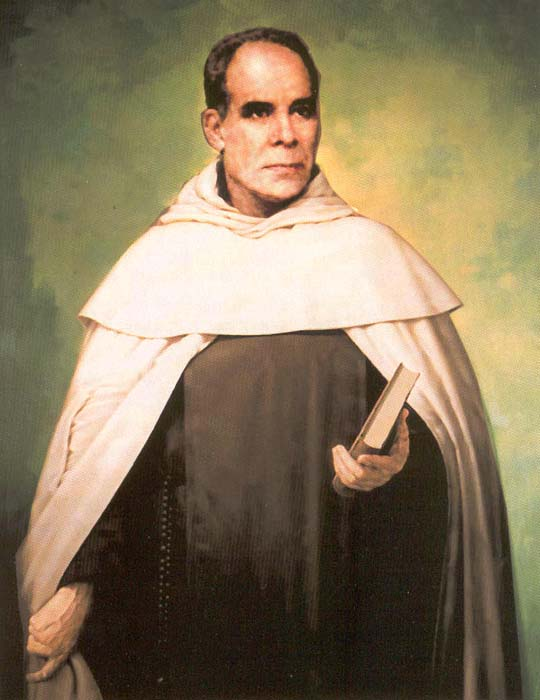 Retrato del beato Francesc Palau i Quer